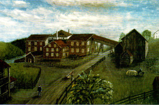 Bild der norwegischen Eisenhütte von 1888